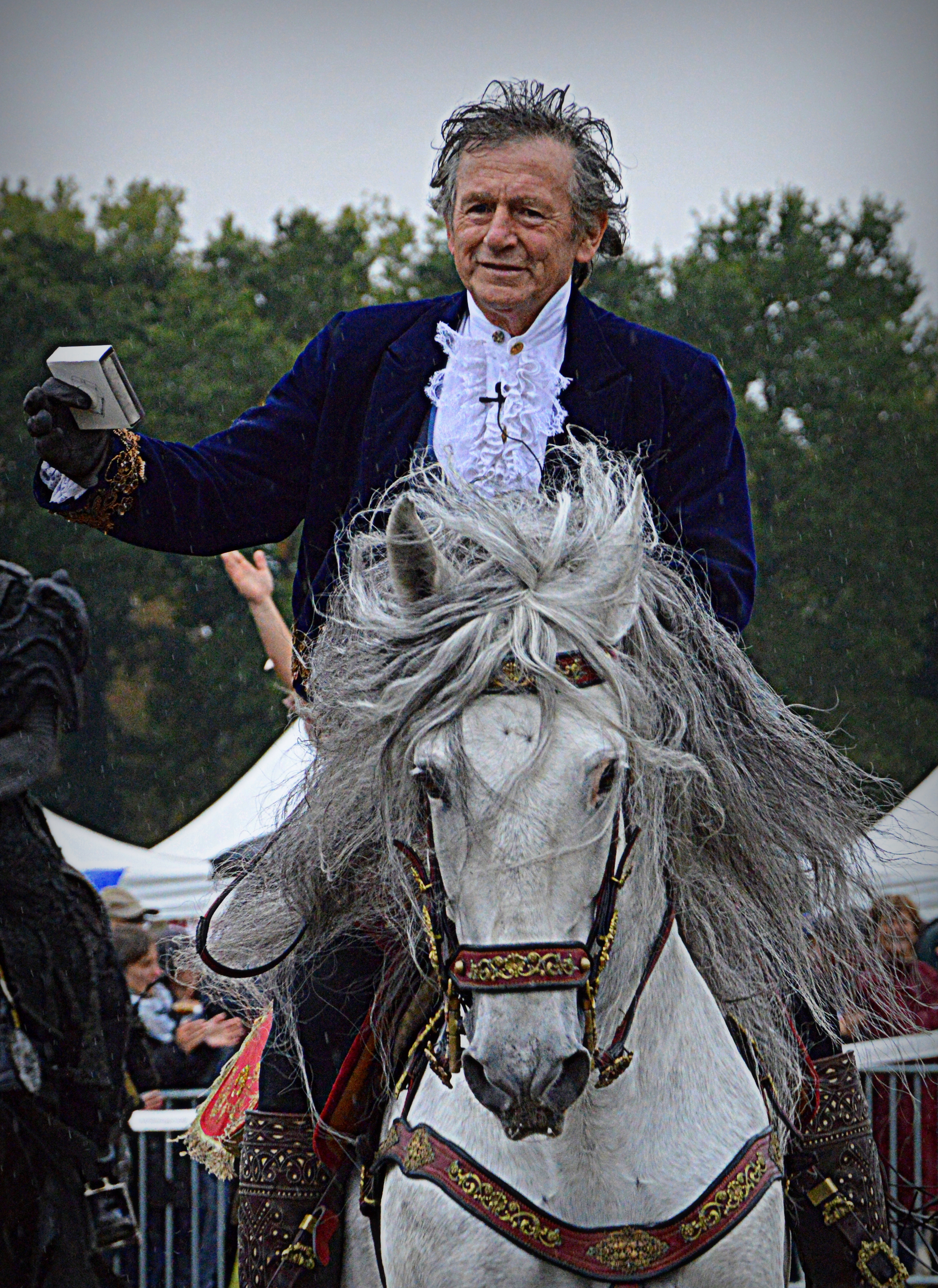 Mario Luraschi à la fête du cheval de Lamorlaye (Oise) en 2014.